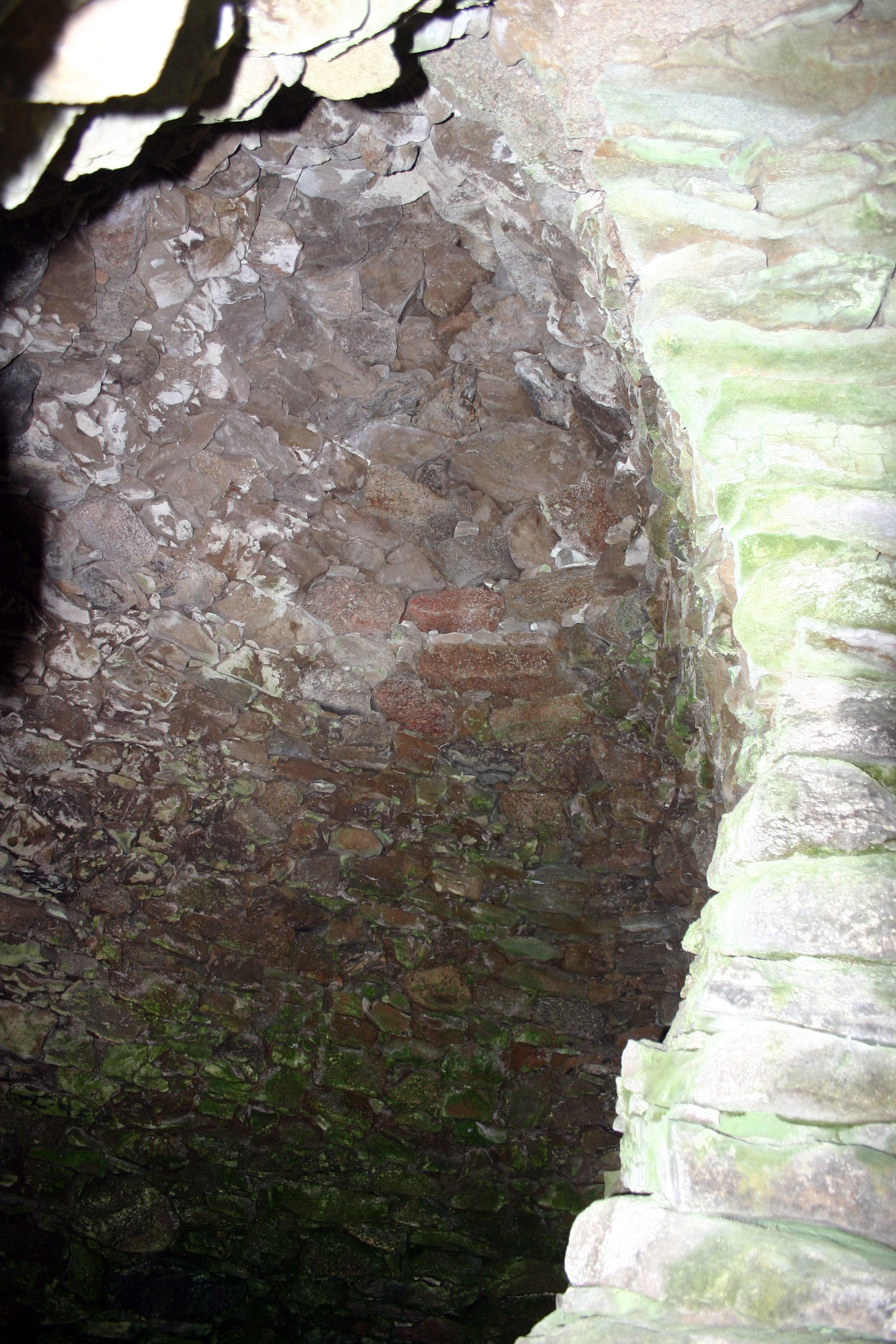 Intérieur du Cairn- Voute de la chambre nord -Ploudalmézeau- Finistère-France